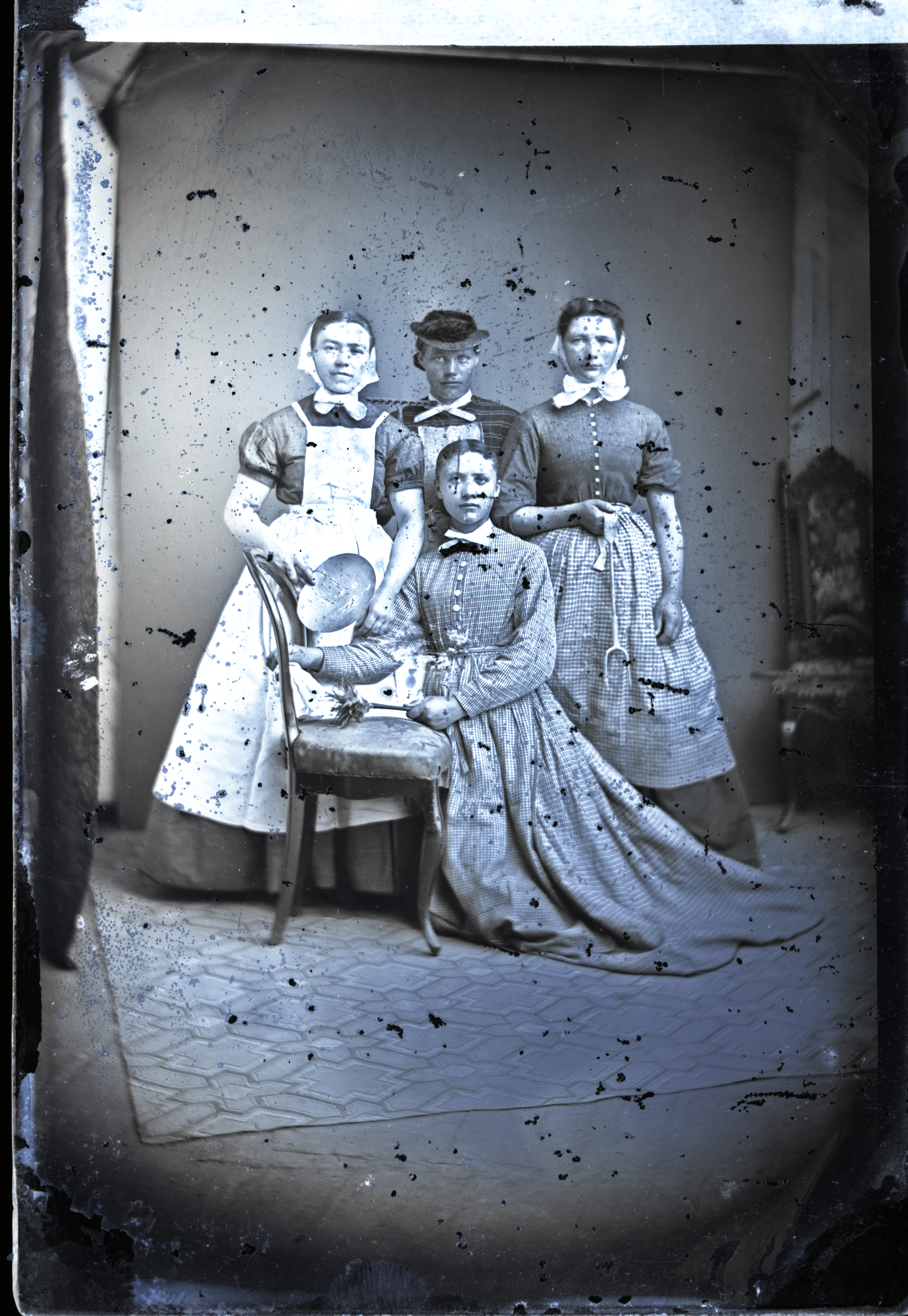 Tjenestefolk fra Kolding eller omegnen. Fotograf: Dines Christian Jochum Pontoppidan Aagaard 1807-1899, billedet er taget mellem 1857-1880.